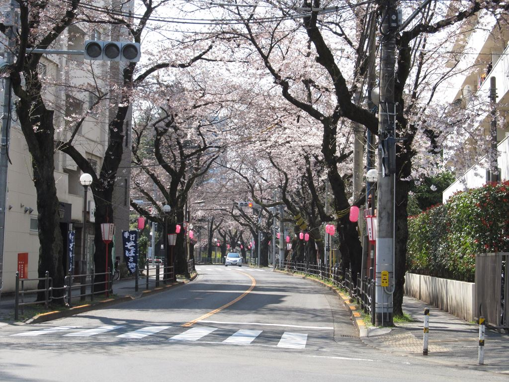 府中市寿町桜通り